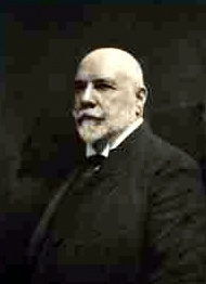 Porträt Sir Paul Eduard von Schoeller, Großindustrieller